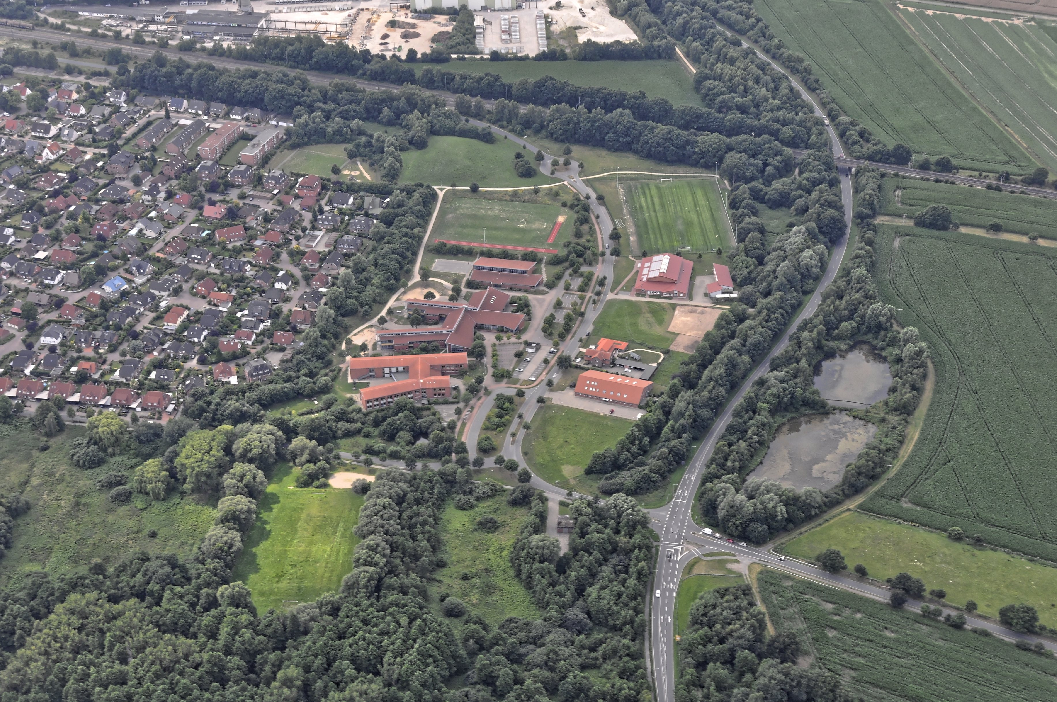 Bilder vom Flug Nordholz-Hammelburg 2015: Syke, Ganztagshauptschule „GTS 2001“, Blick von Osten.